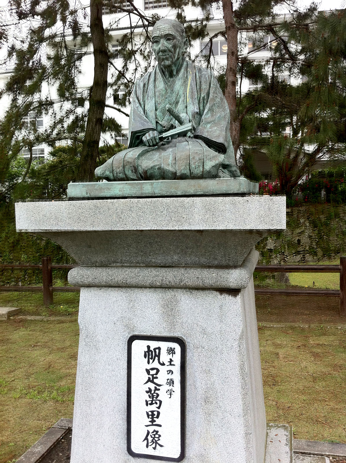 帆足萬里像（大分県速見郡日出町）